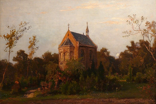 Waldkapelle im Lantz'schen Park, Düsseldorf-Lohausen. Öl auf Leinwand, 38 x 59 cm, bezeichnet, datiert und signiert »Haus Lohausen 2. Sept. 85 F. v. W.«